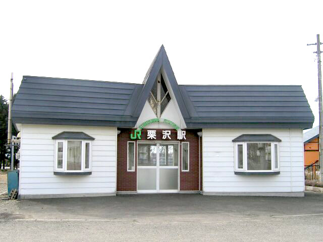 Kurisawa Station in Muroran Main Line, Japan